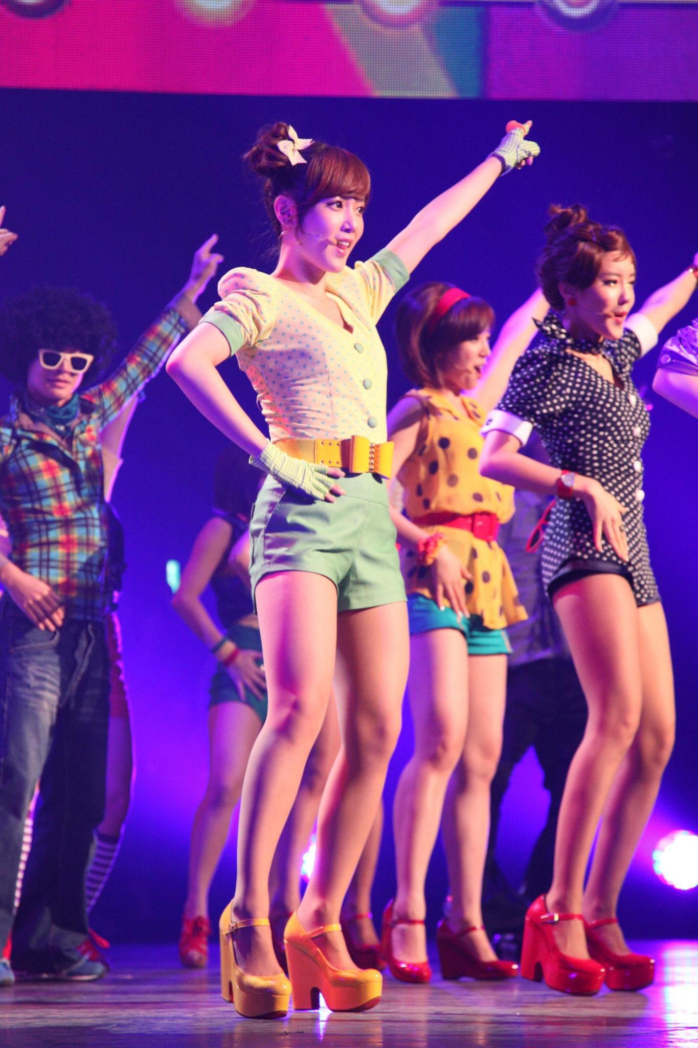 티아라 @ Cyworld Dream Music Festival 싸이월드 드림 뮤직 페스티벌_19